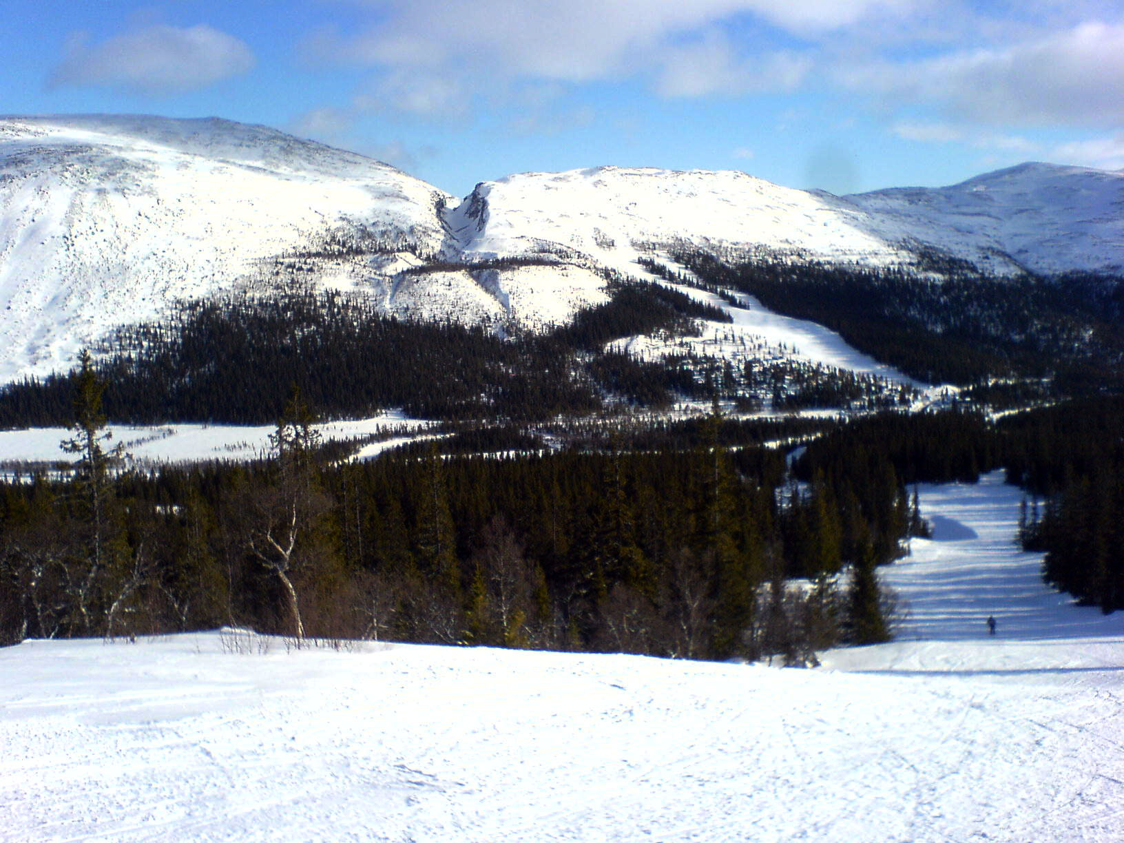 Dromskåran i Bydalen sedd från Hovdeliften.